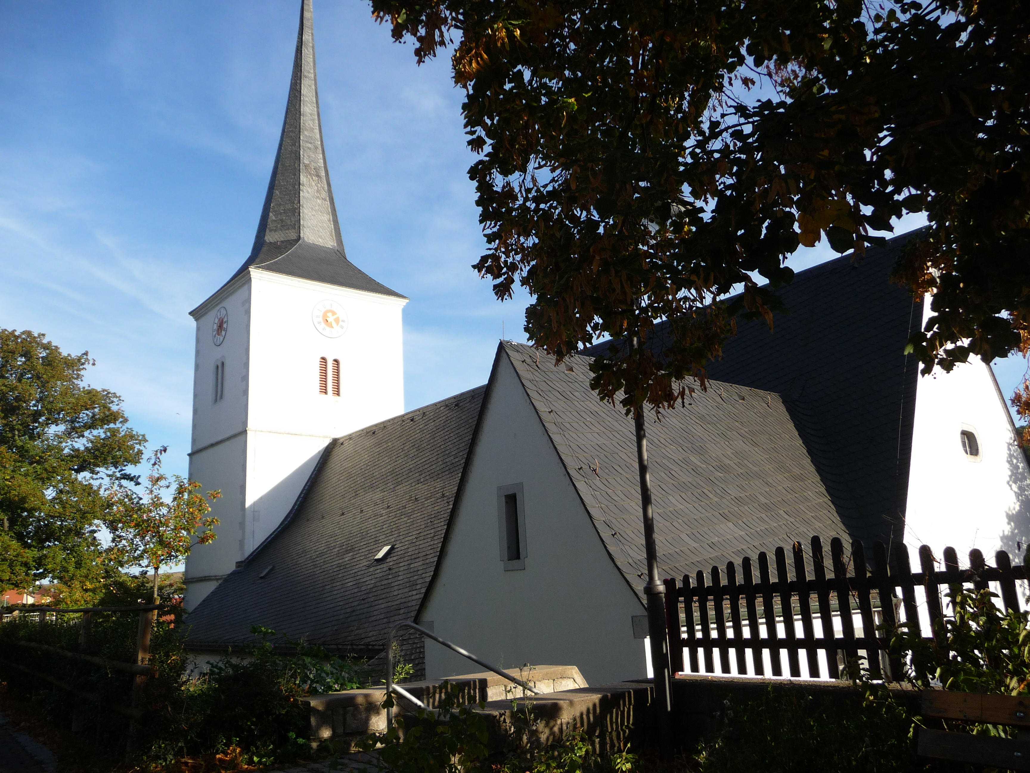 Kirche St. Johannes Baptist in Theilheim